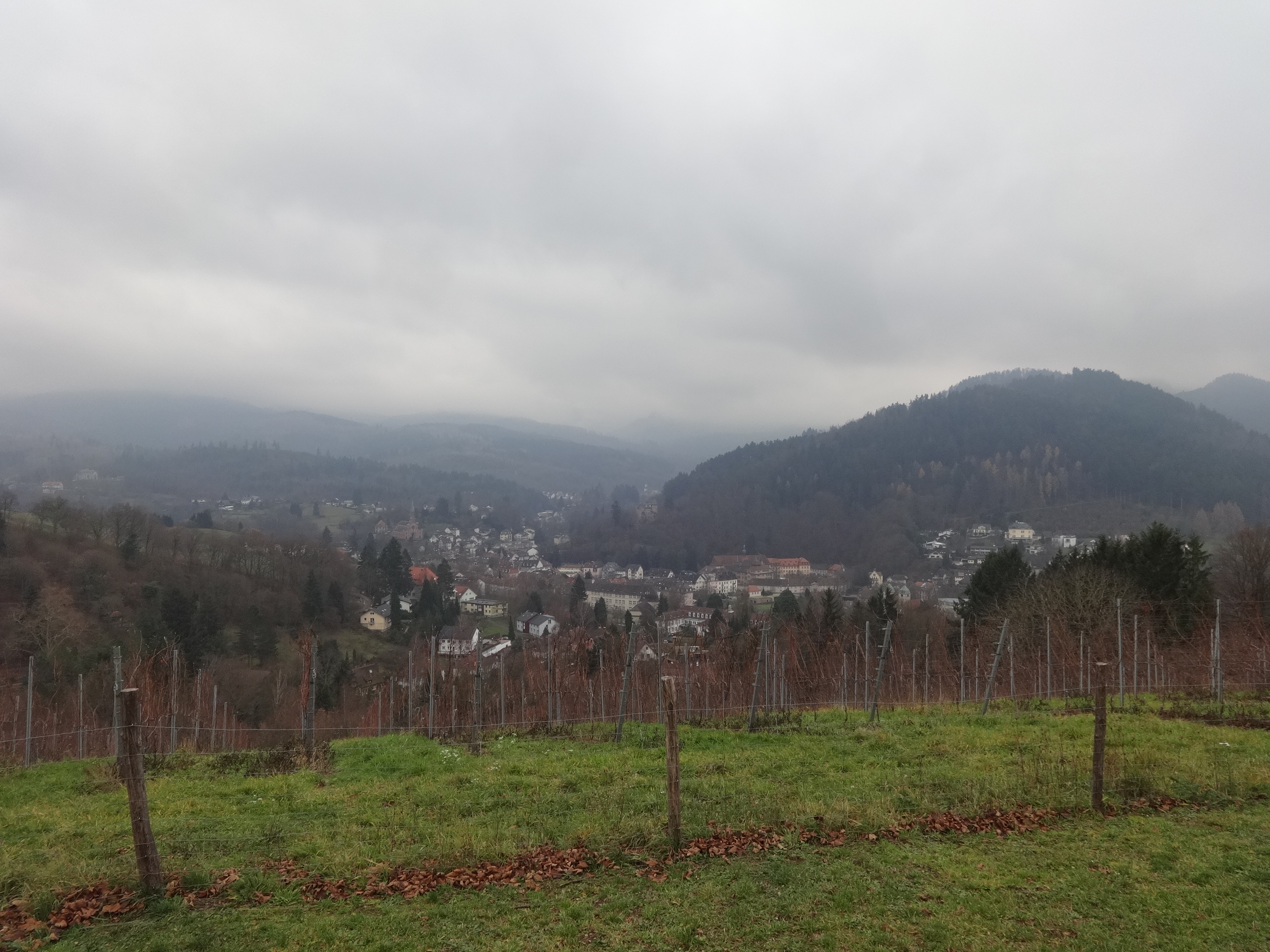 Der Panoramaweg Baden-Baden ist ein rund 40 Kilometer langer Wanderweg, der um die Stadt Baden-Baden führt. Er wurde 1997 neugestaltet und 2004 vom Deutschen Tourismusverband als „schönster Wanderweg“ ausgezeichnet.